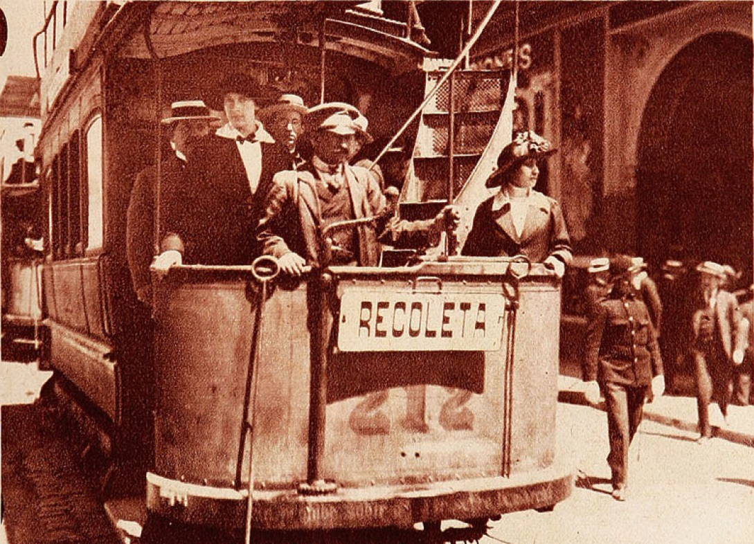 Un "completo" a la hora del mediodía en el cual se ven empleados de ambos sexos. En Revista "Sucesos" (1902-1932)